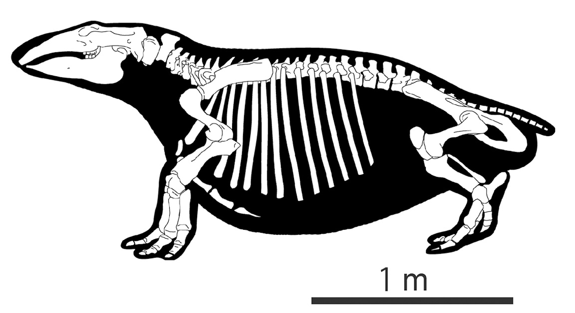 Skeletal illustration of Desmostylus